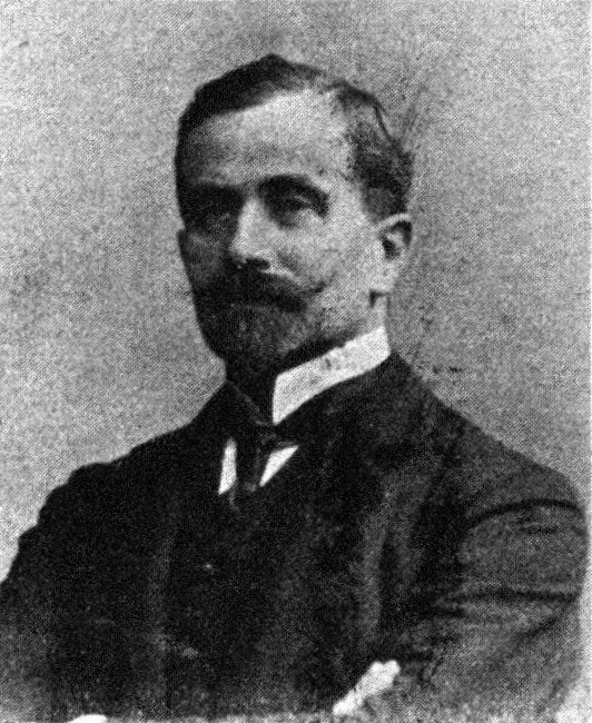 Österreichischer Politiker, Reichsratswahl 1907, Name siehe Dateiname